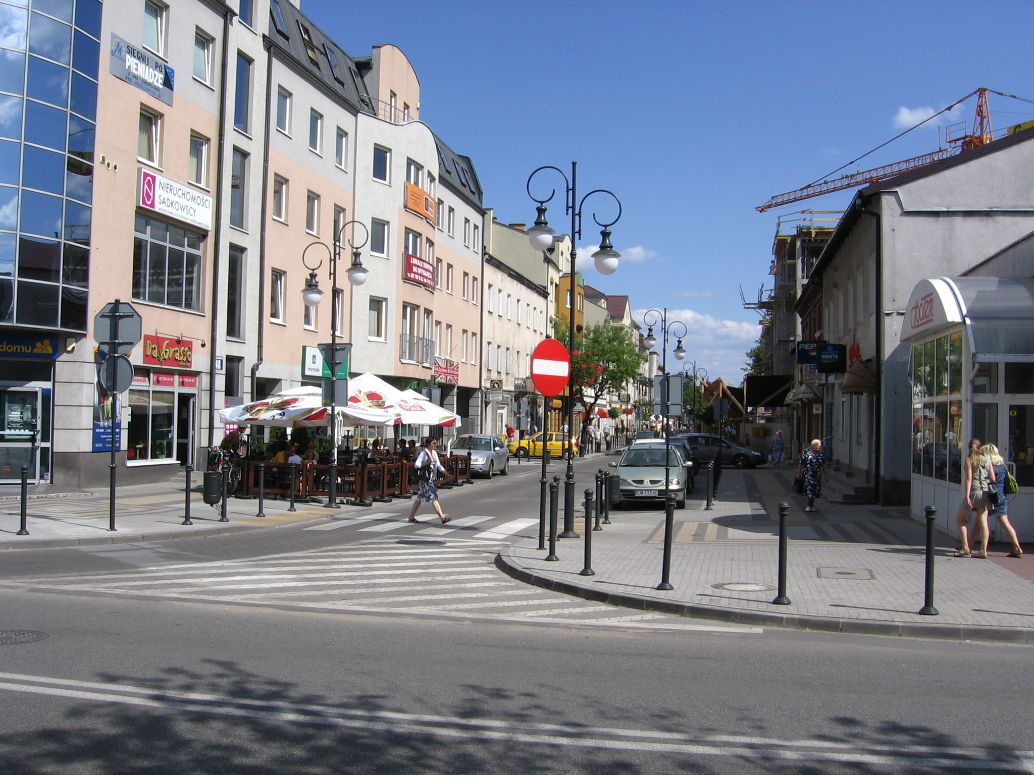 Centrum Pruszkowa